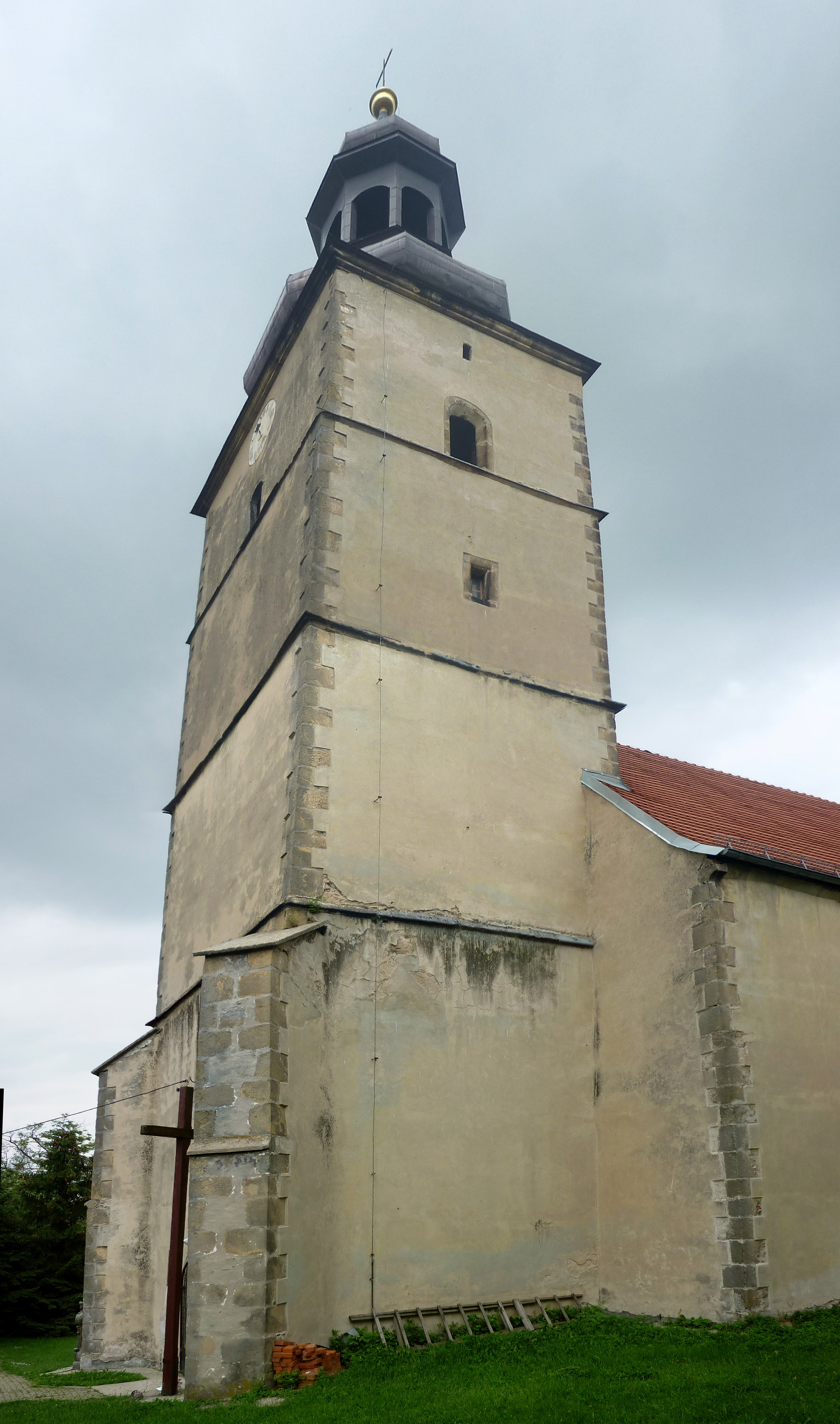 Dreifaltigkeitskirche in Schönwaldau (Rząśnik) in Niederschlesien